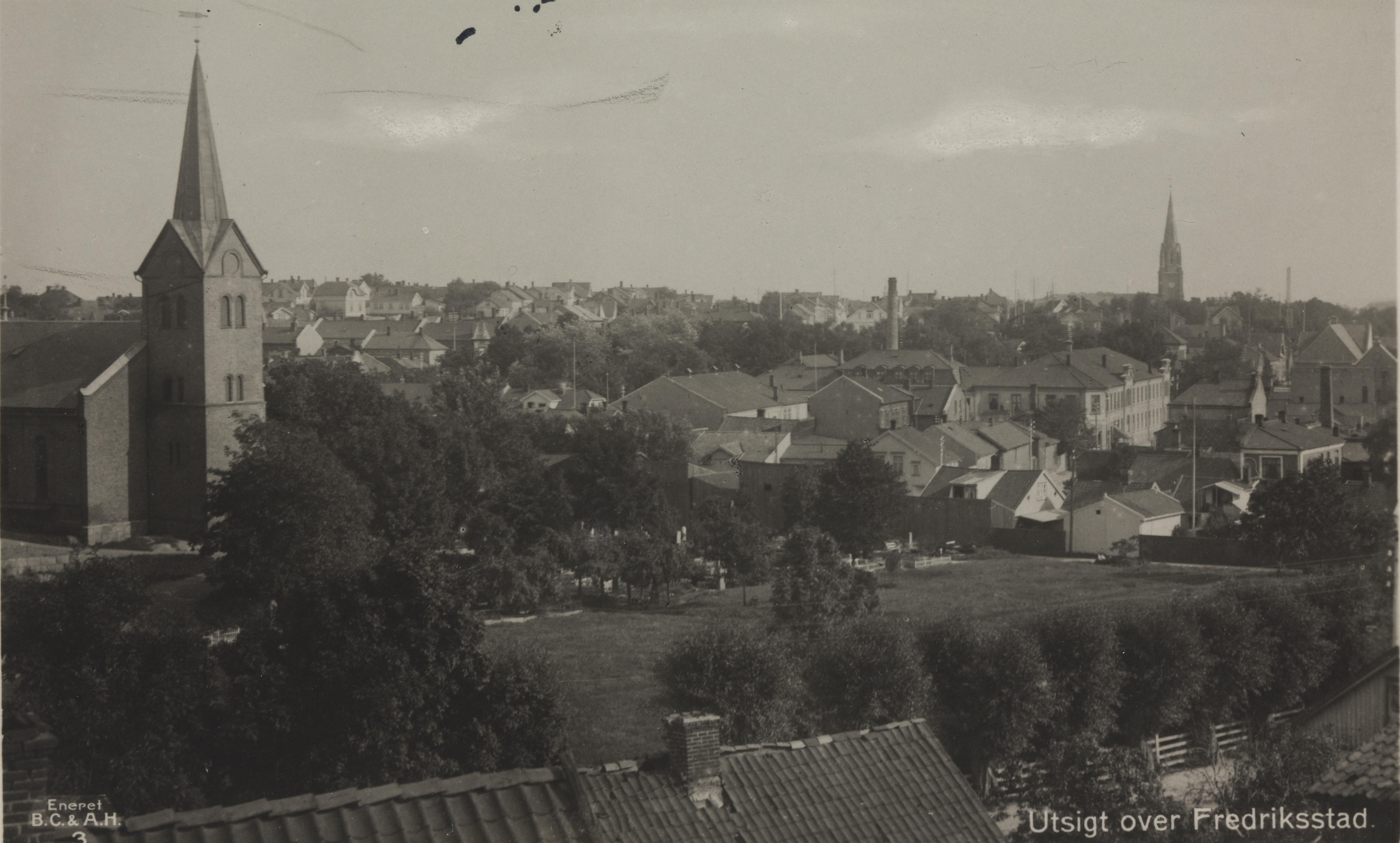 Bildet er hentet fra Nasjonalbibliotekets bildesamling The church at the left, Glemmen kirke, burnt down october 20th 1944. Photograph is probably taken from Sankthansfjellet with Glemmengata at the bottom of the picture.